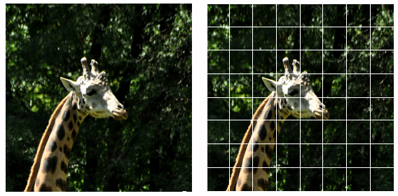 Proceso de partición de una imagen para su DDC (Descriptor de la Distribución del Color).